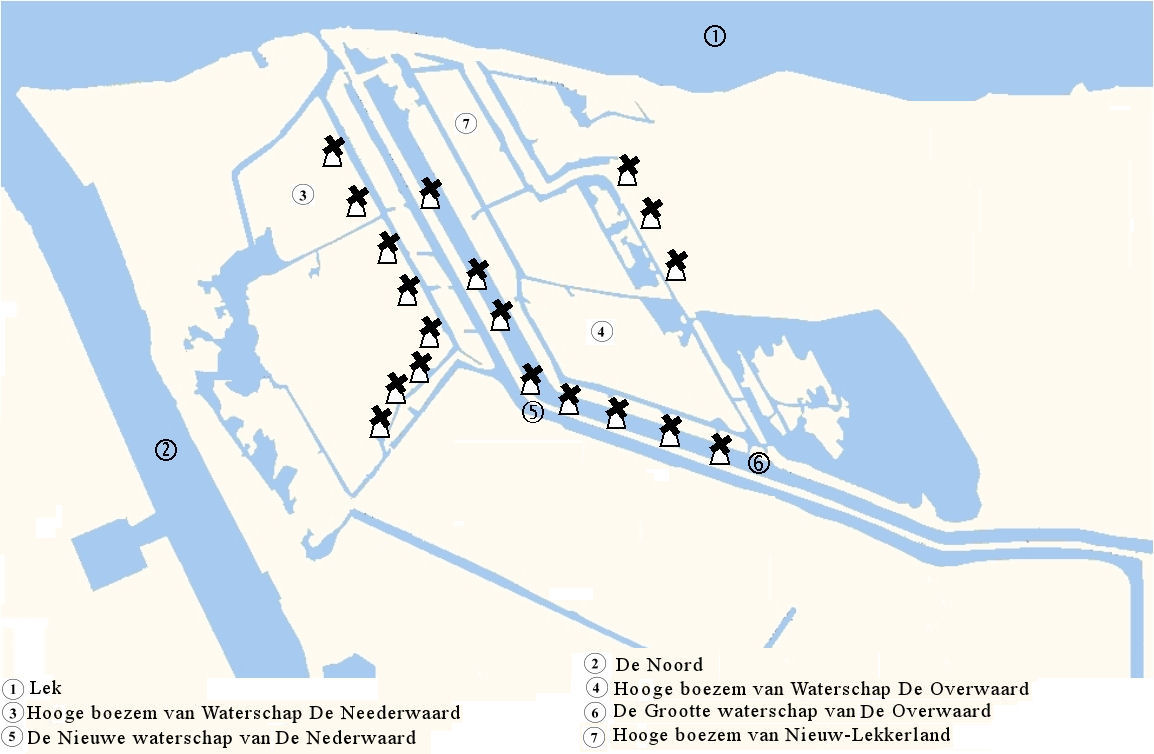 Kinderdijk text nl